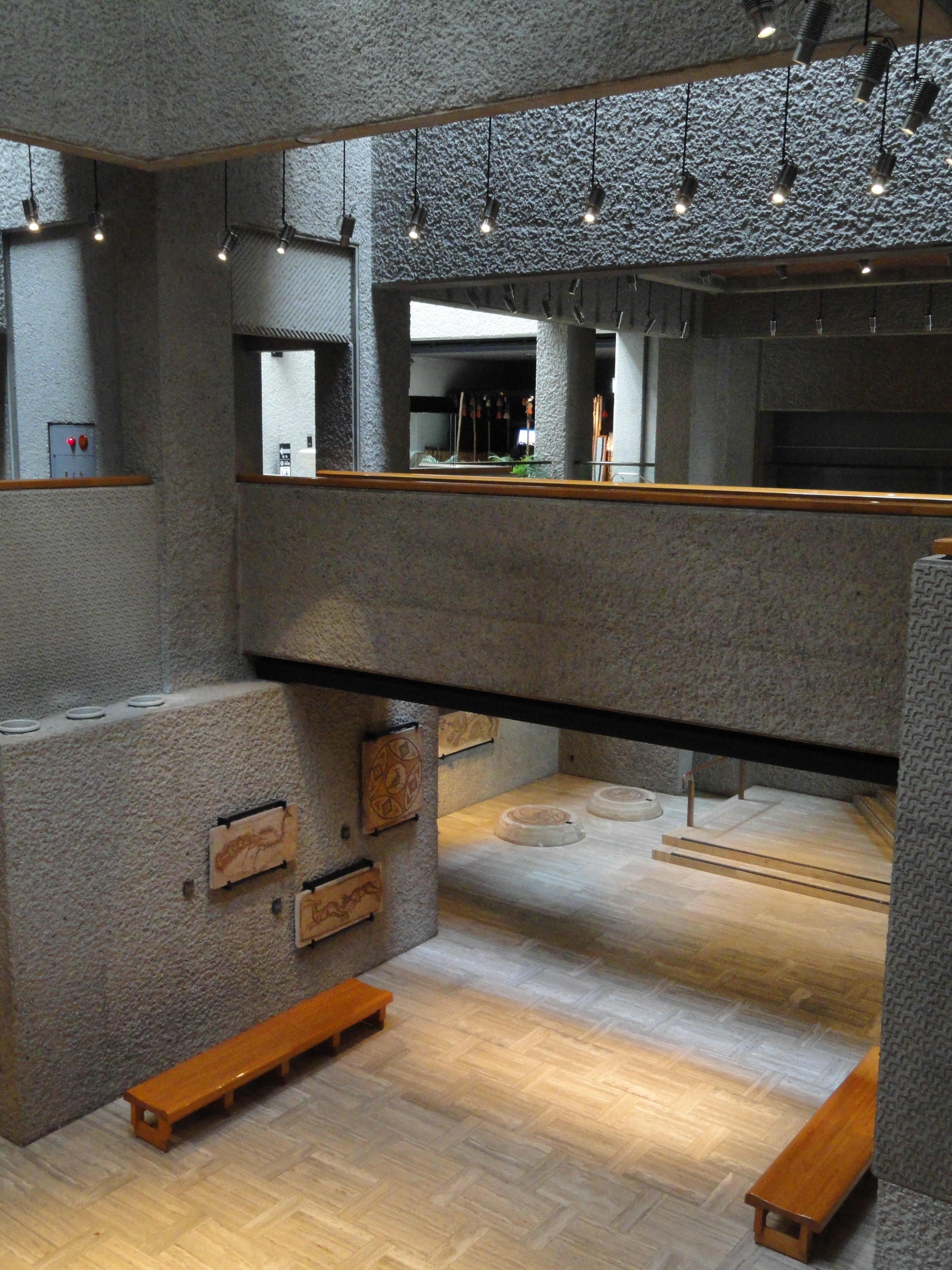 Exhibit in the Okayama Orient Museum (岡山市立オリエント美術館), 9-31 Tenjin-cho, Okayama City, Okayama, Japan.